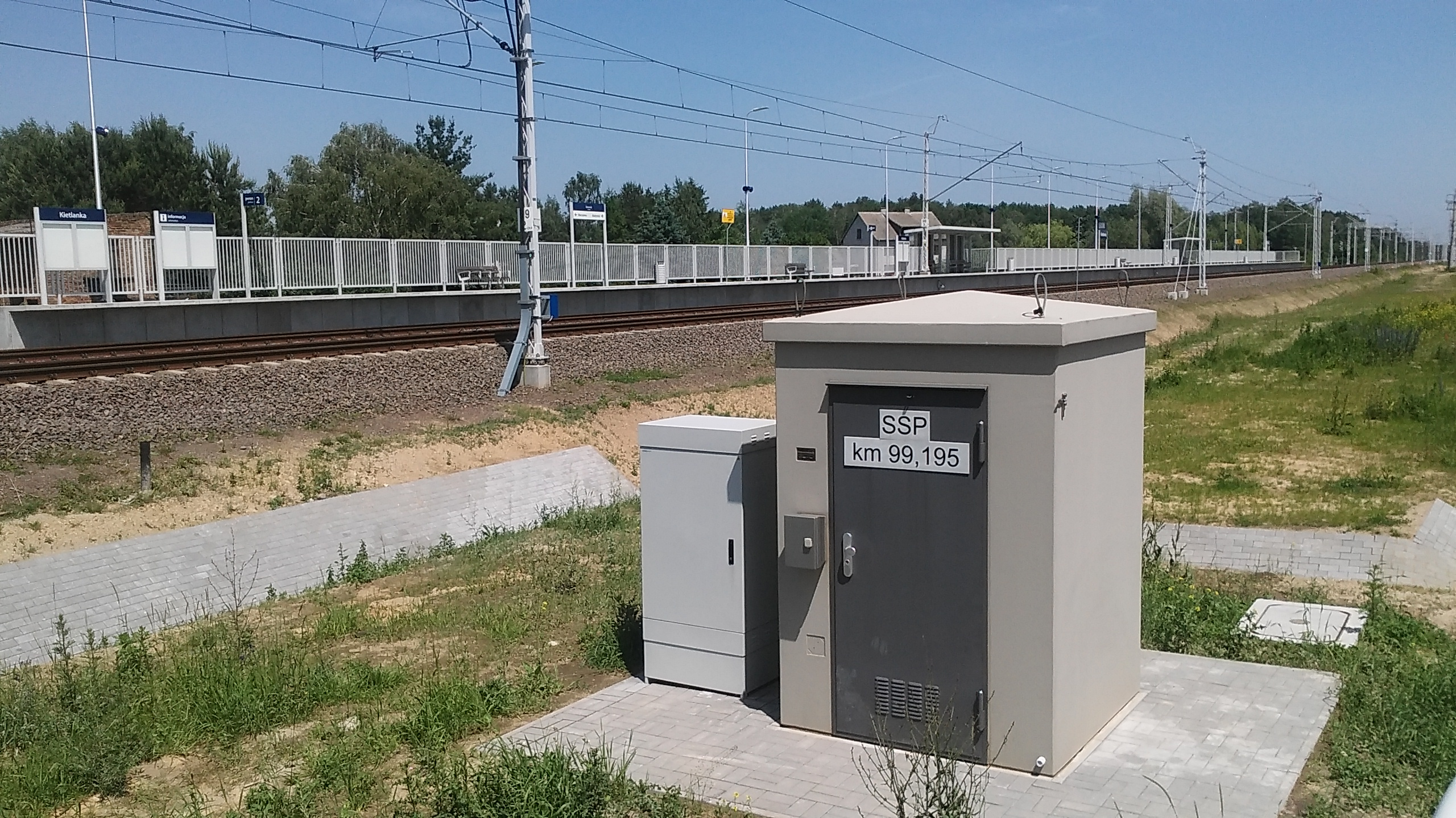 przystanek kolejowy Kietlanka - samoczynna sygnalizacja przejazdowa, pikietaż i peron 2 (w kierunku Warszawy)